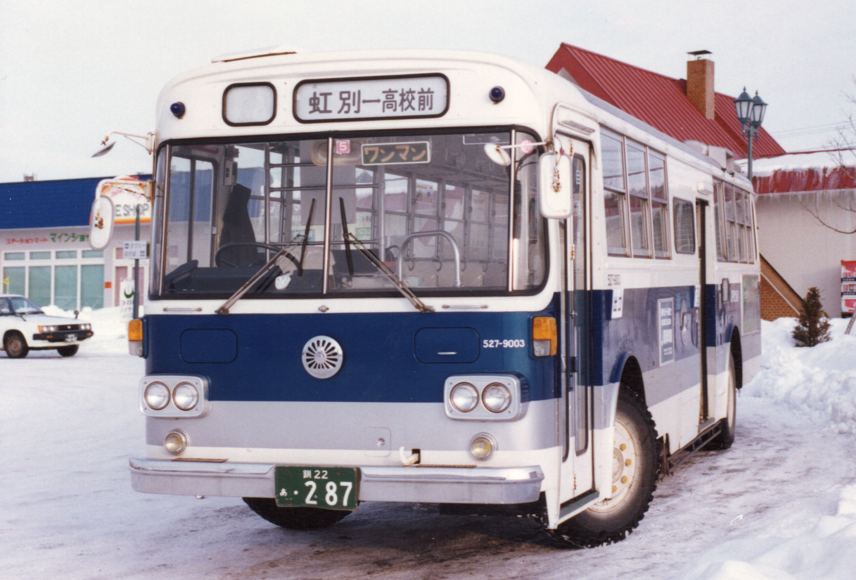 標茶駅前にて撮影 撮影時期失念